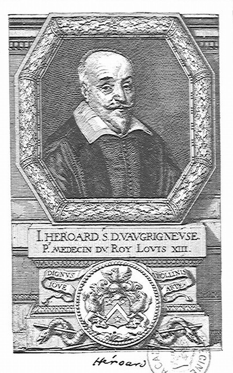 Portrait de Jean Héroard (1551-1628)